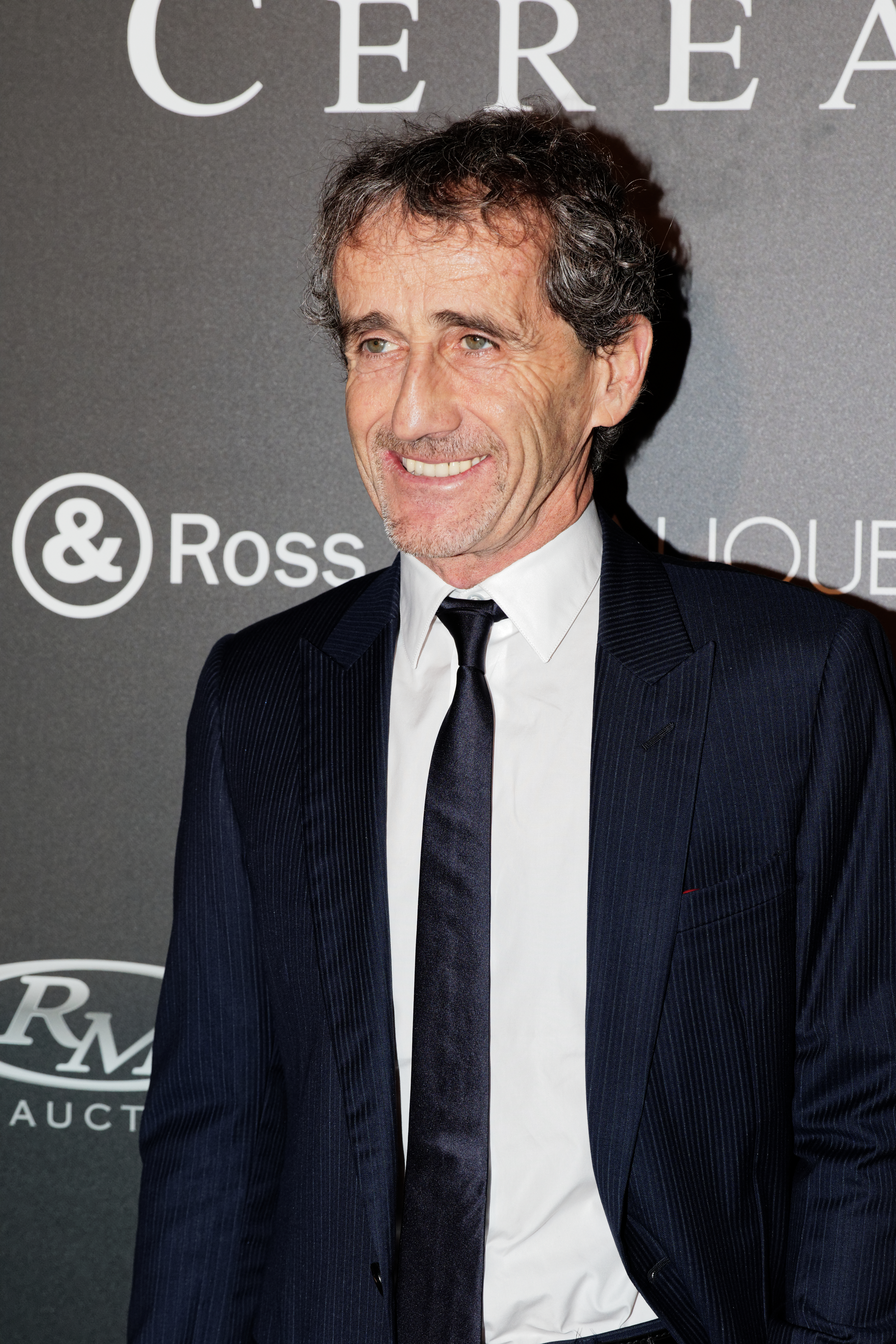 Photocall du festival automobile international 2015.